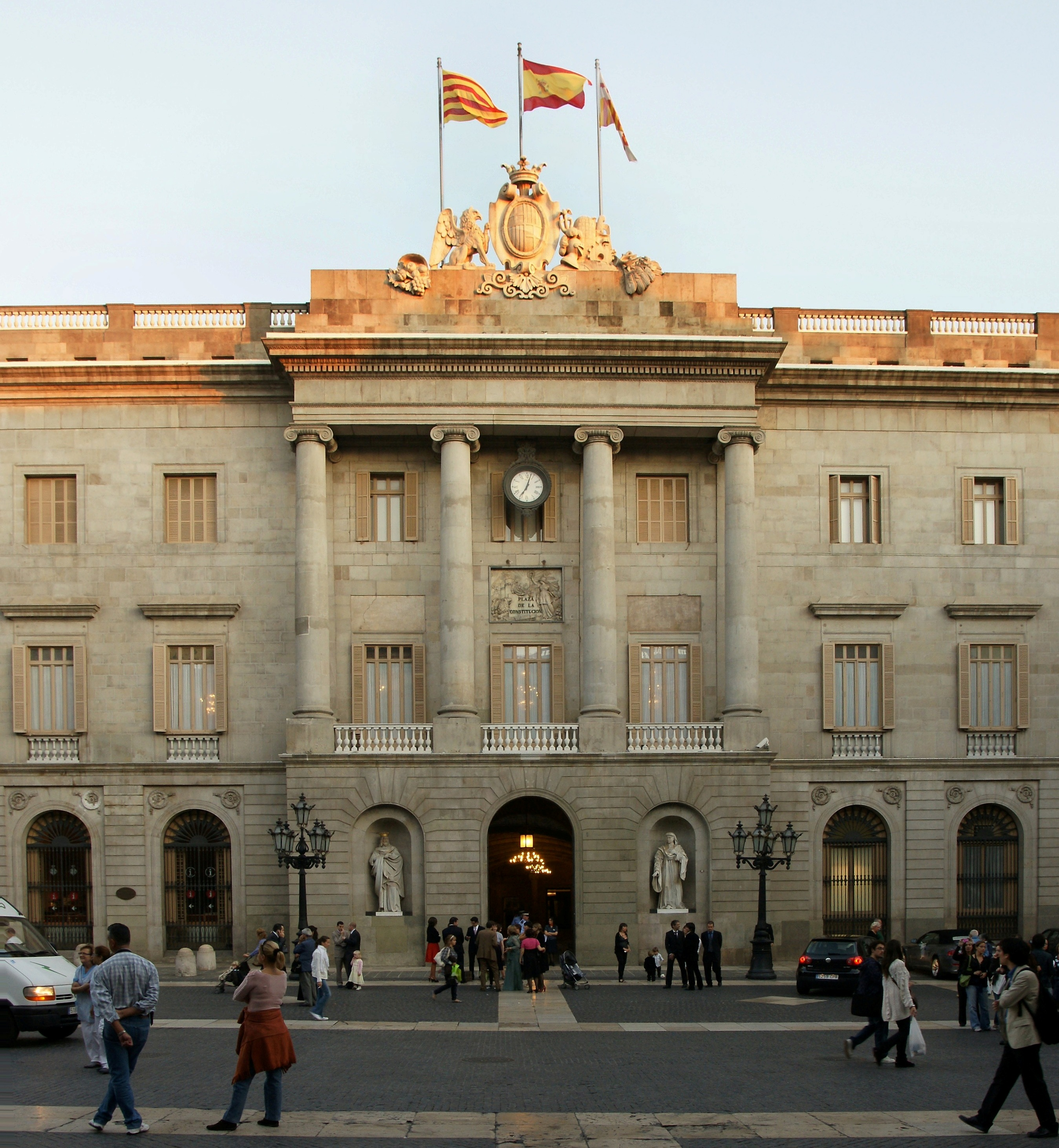 Das "Casa de la Ciutat", heute Sitz der katalanischen Regionalregierung steht an der Südostseite der "Plaça de Sant Jaume" in Barcelona.